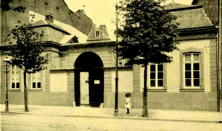 Eingang Haus Fey in Aachen, Seilgraben 34